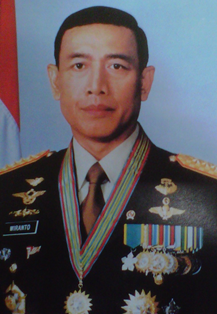 Jenderal TNI Wiranto saat sebagai Panglima ABRI Licensing Kategori:Panglima TNI